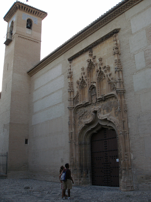 Torre mudéjar y fachada isabelina de la iglesia del monasterio de Santa Isabel la Real Granada, España. Mudéjar tower and Isabelline portal of the church at Santa Isabel la Real Monastery, in Granada, Spain.